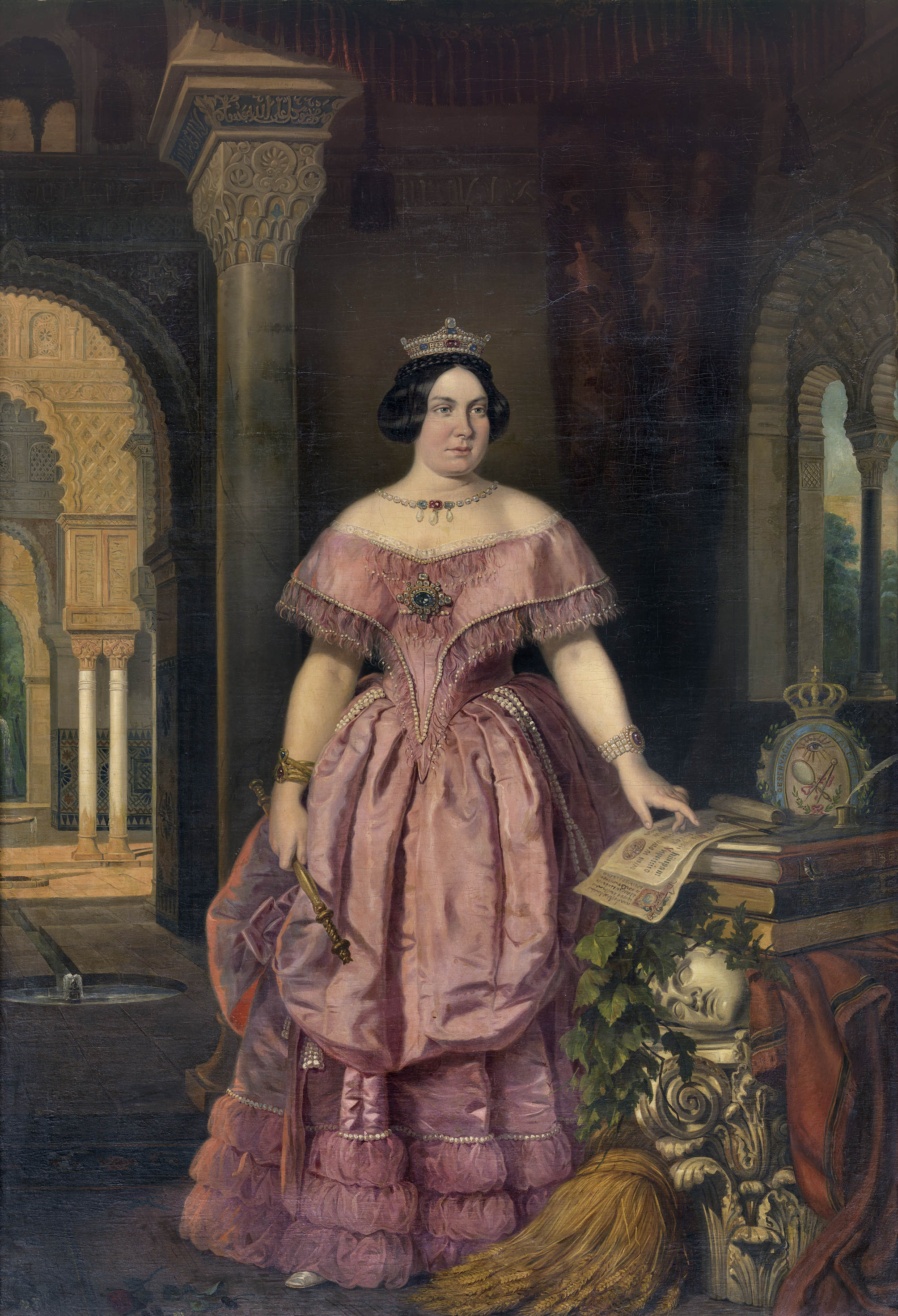 Retrato de la reina Isabel II de España (1830-1904), que fue la hija y heredera del rey Fernando VII y la madre de Alfonso XII.